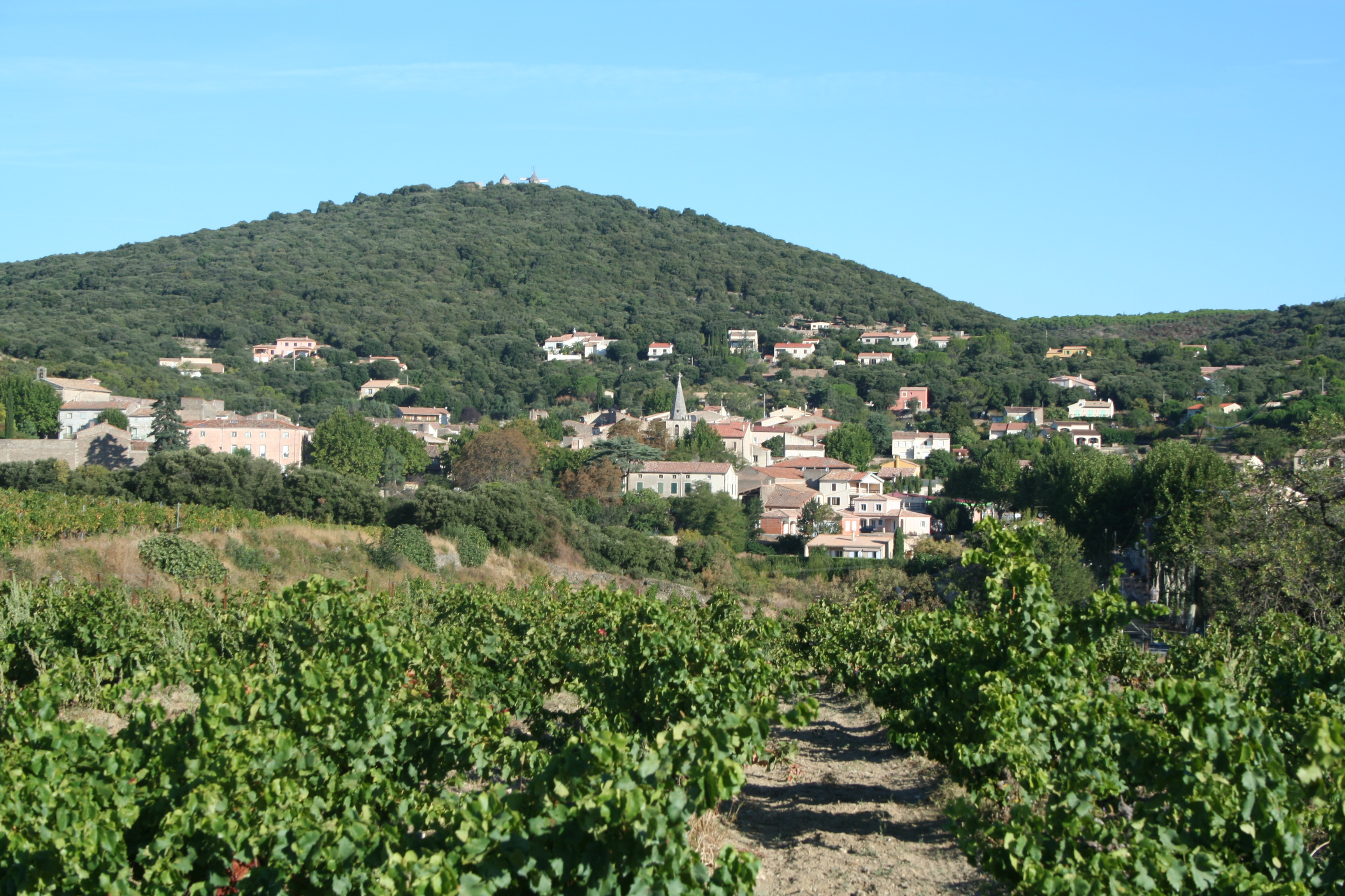 Faugères (Hérault) - Vue générale sur le village. À l'arrière plan, les trois moulins à vents. Au premier plan, le vignoble.